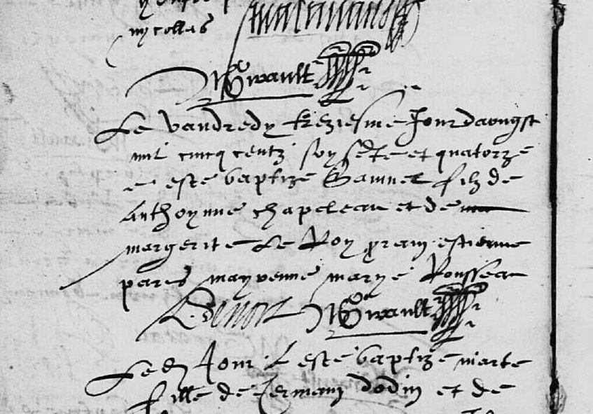 L'acte de baptême de Samuel de Champlain Se lit: « Le vendredy treziesme jour daoust mil cinq centz soyxante et quatorze a esté baptizé Samuel filz de Anthoynne Chapeleau et de Marguerite le Roy parain Estienne Paris et marainne Marye Rousseau » (selon Eric Thierry, historien à la Société historique de Québec)